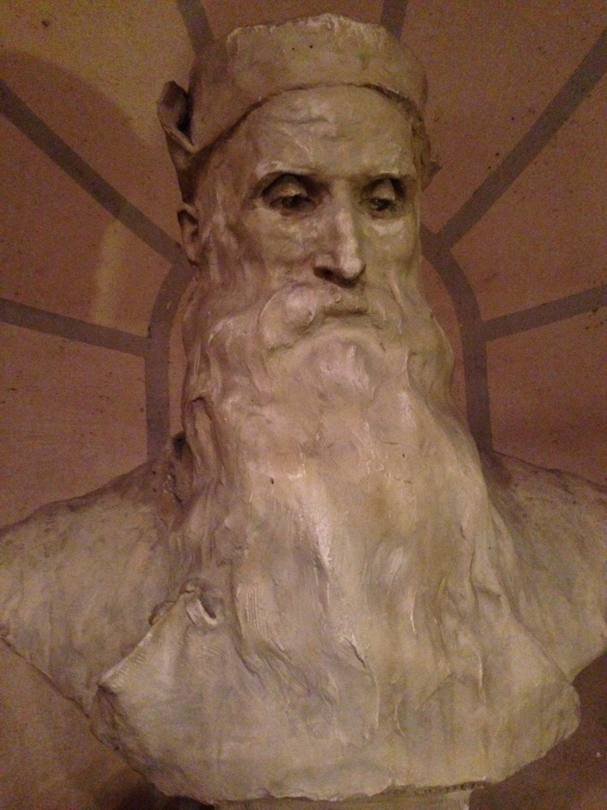 Buste de Michel Colombe par François Sicard, opéra de Tours, France.